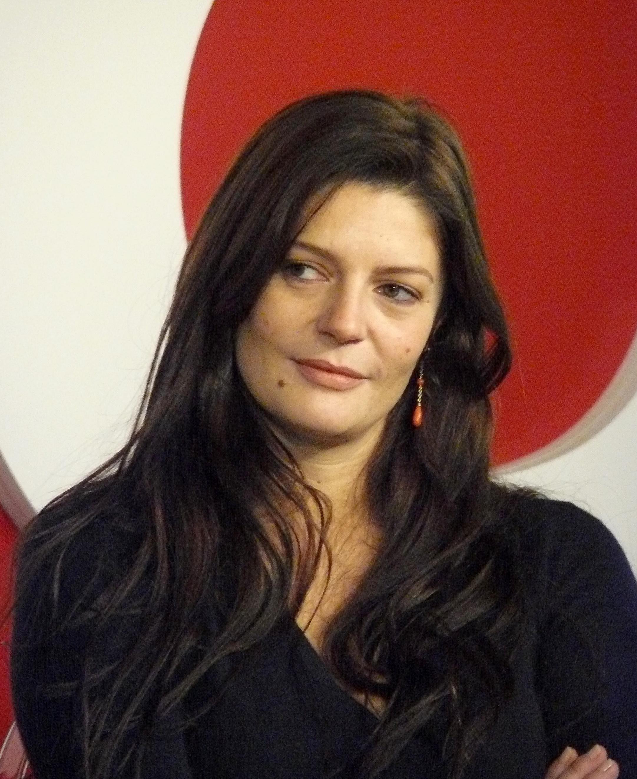 Chiara Mastroianni (née en 1972), actrice franco-italienne. Lors de la présentation de la sortie DVD de son film Non, ma fille tu n'iras pas danser ! à la FNAC Montparnasse, le 23 janvier 2010.